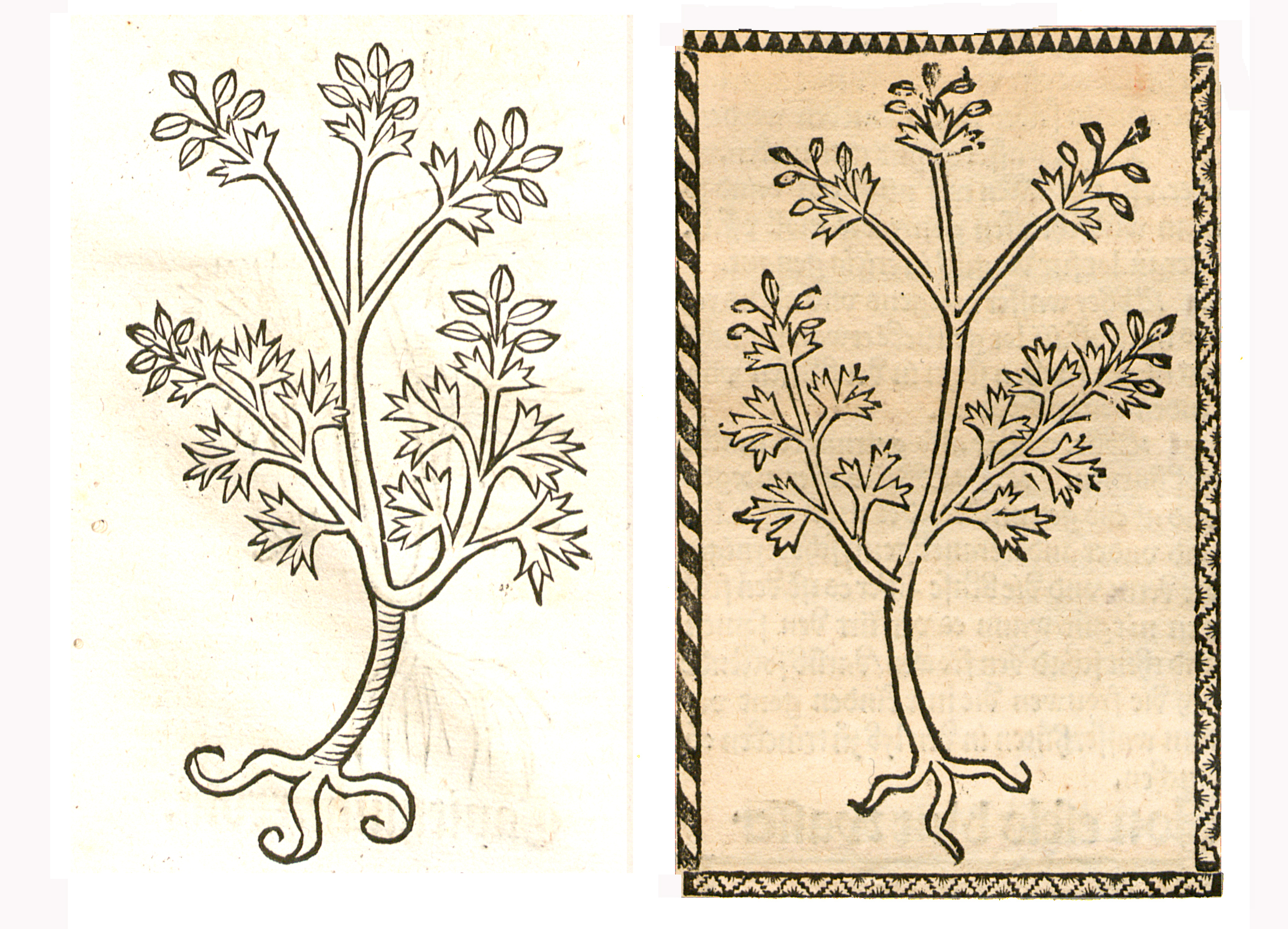 Abbildung von Enis (Pimpinella anisum)